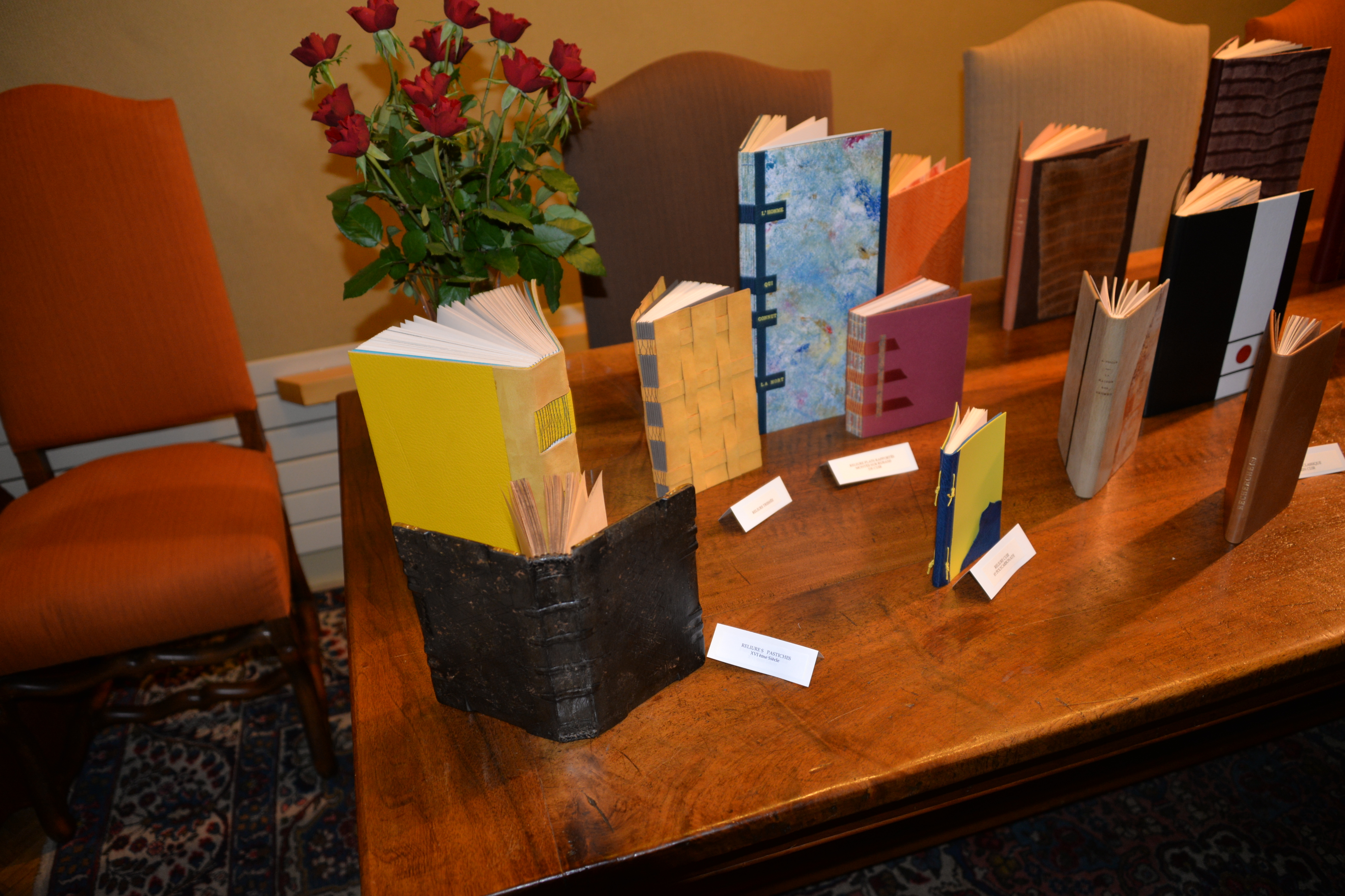 2014 11 23 exposition des artistes Atelier de reliure traditionnelle